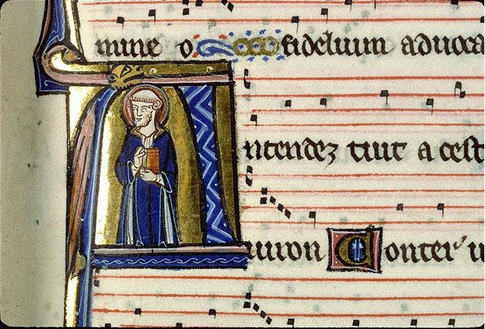 f29 Epître farcie de saint Étienne